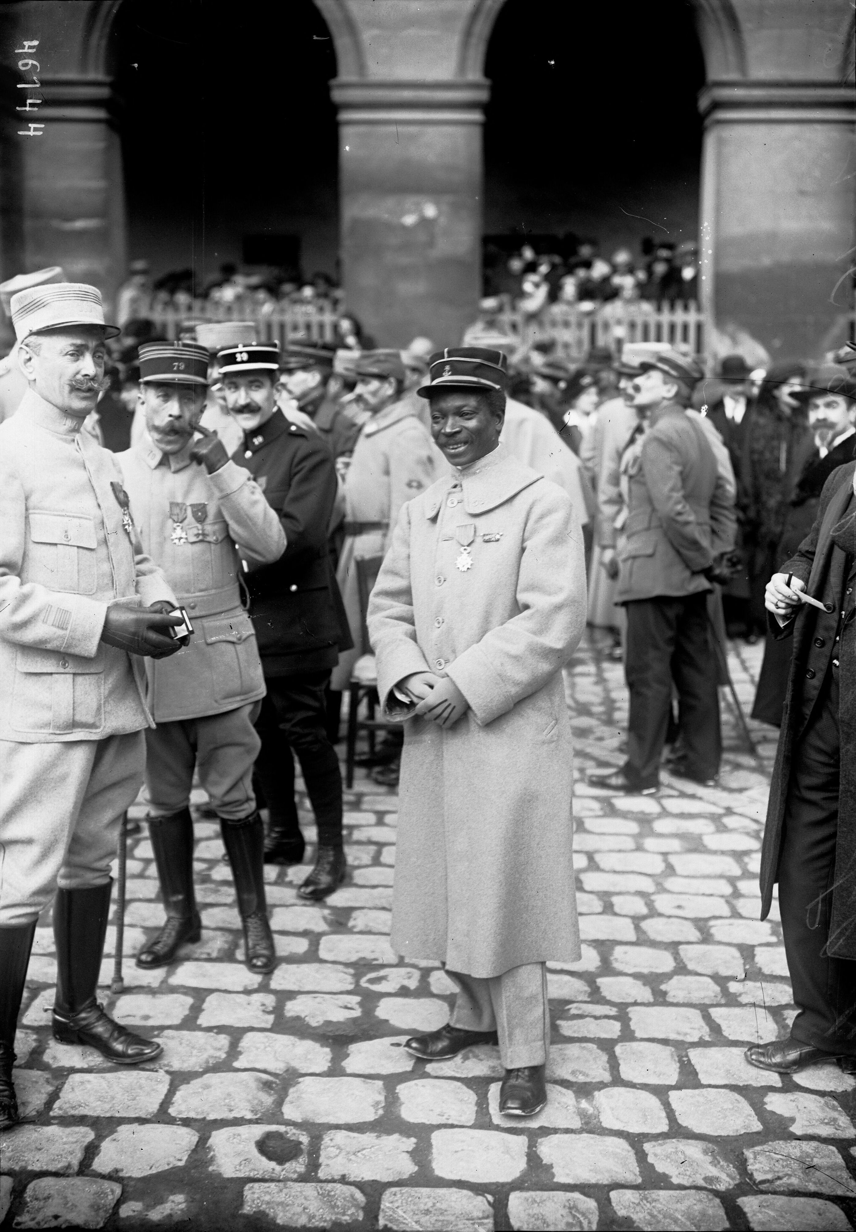 20-1-16 : Dinah Salifou fils, décoré de la légion d'honneur [photographie de presse]